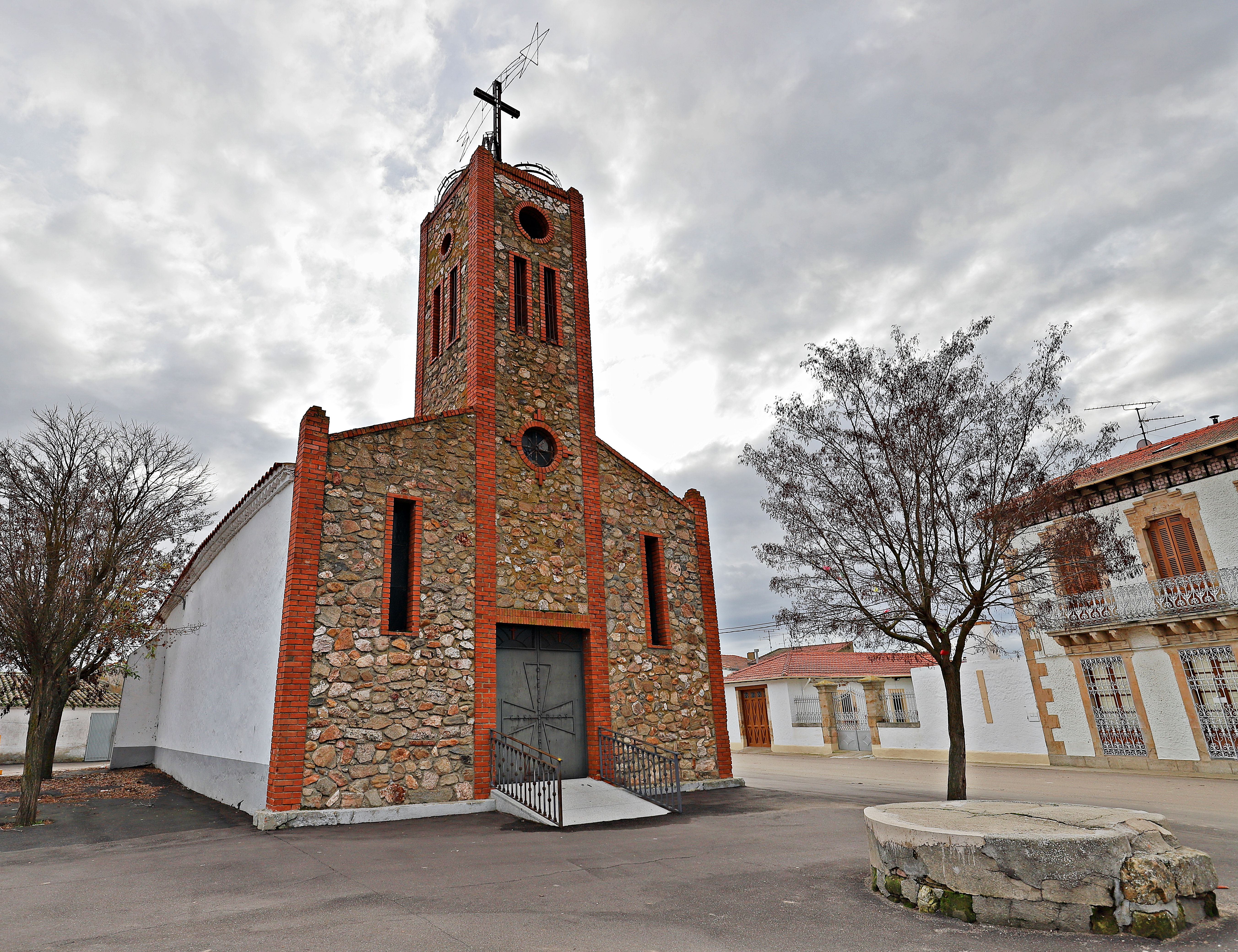 Encinas de Arriba municipio de la comarca Tierra de Alba, en la provincia de Salamanca.